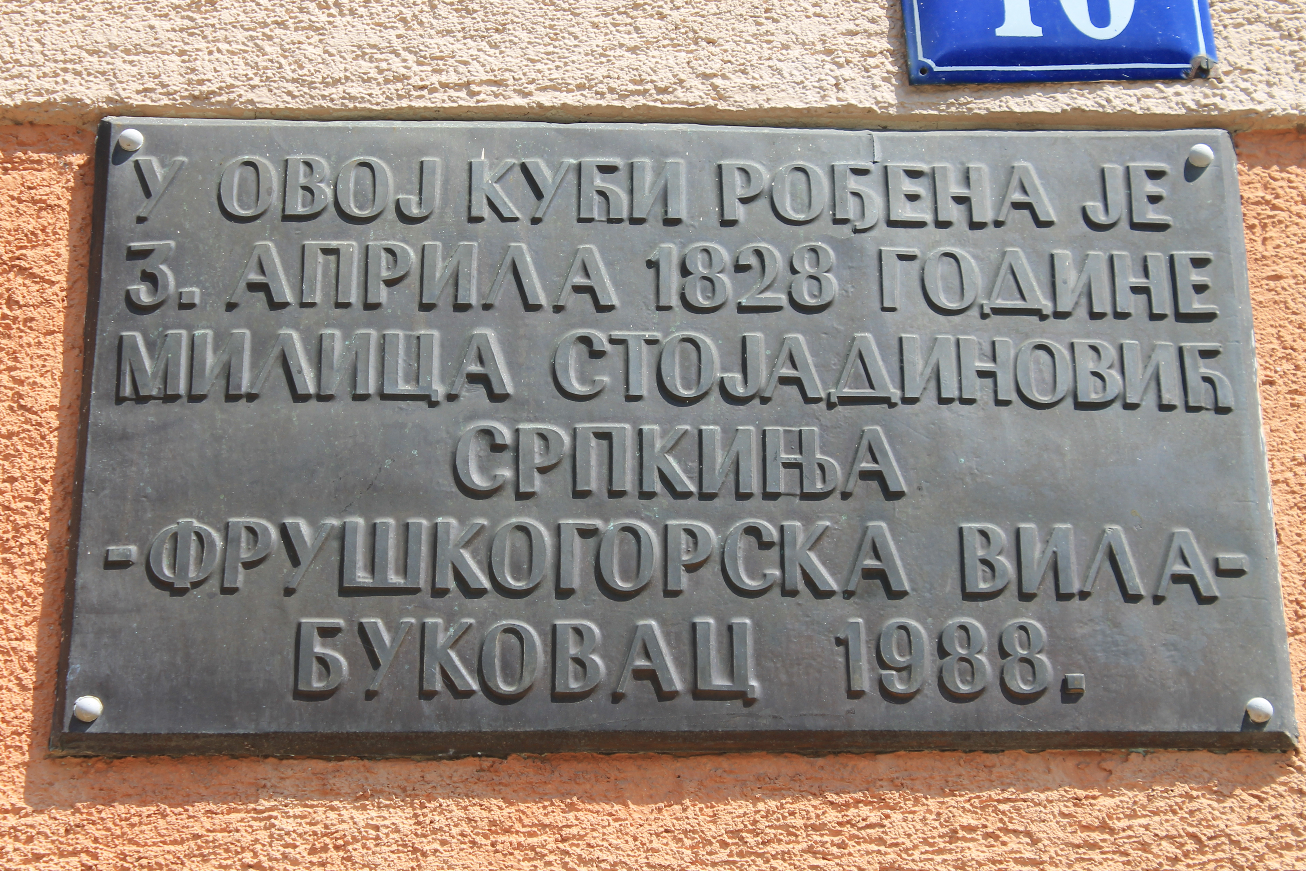 Rodna kuća Milice Stojadinović Srpkinje u Bukovcu